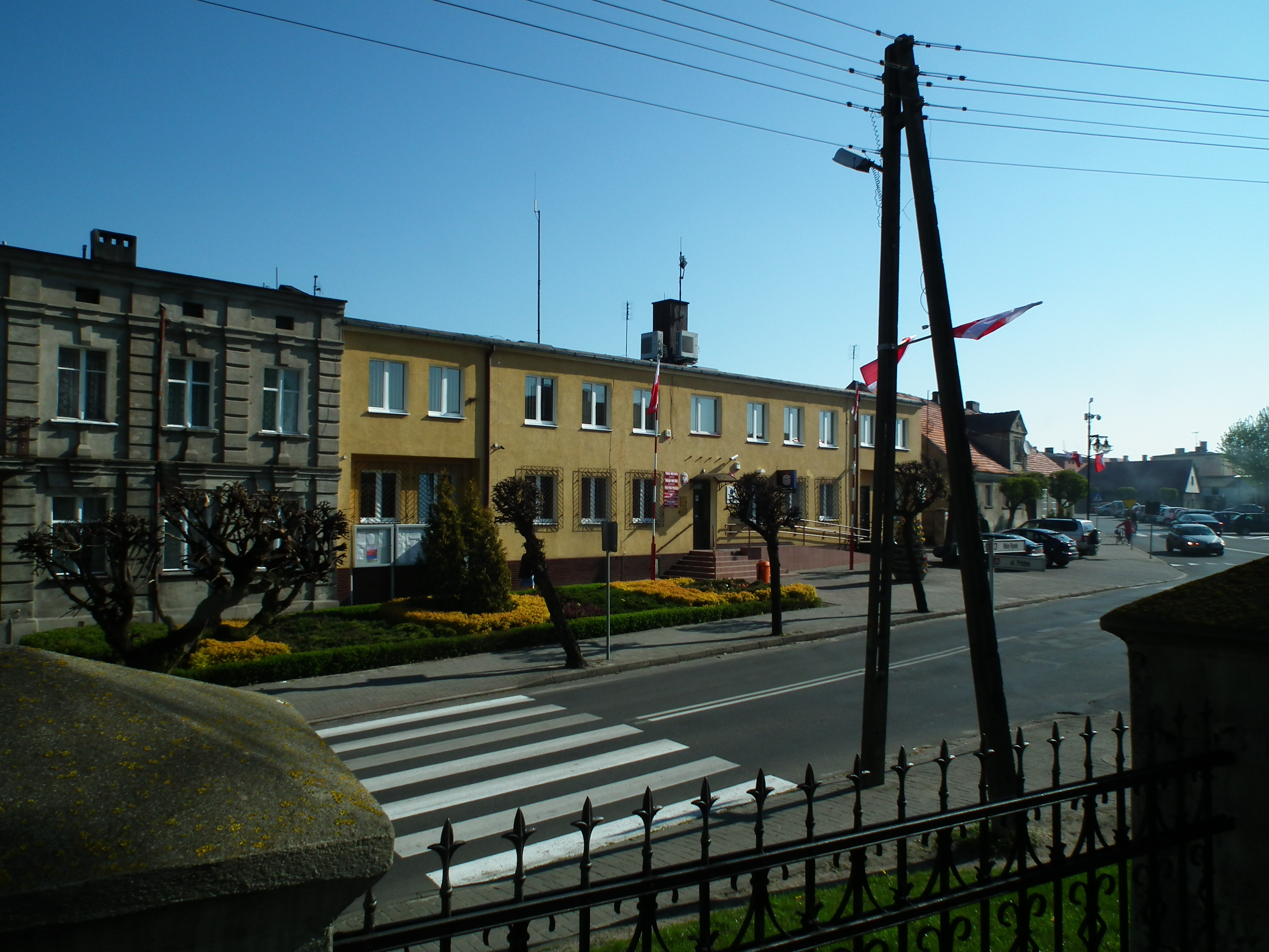 Rynek w Zagórowie. Urząd Miasta i Gminy i okolice.